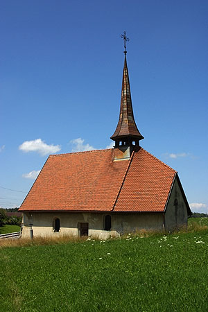 Vaulruz: Kapelle, die zerfällt